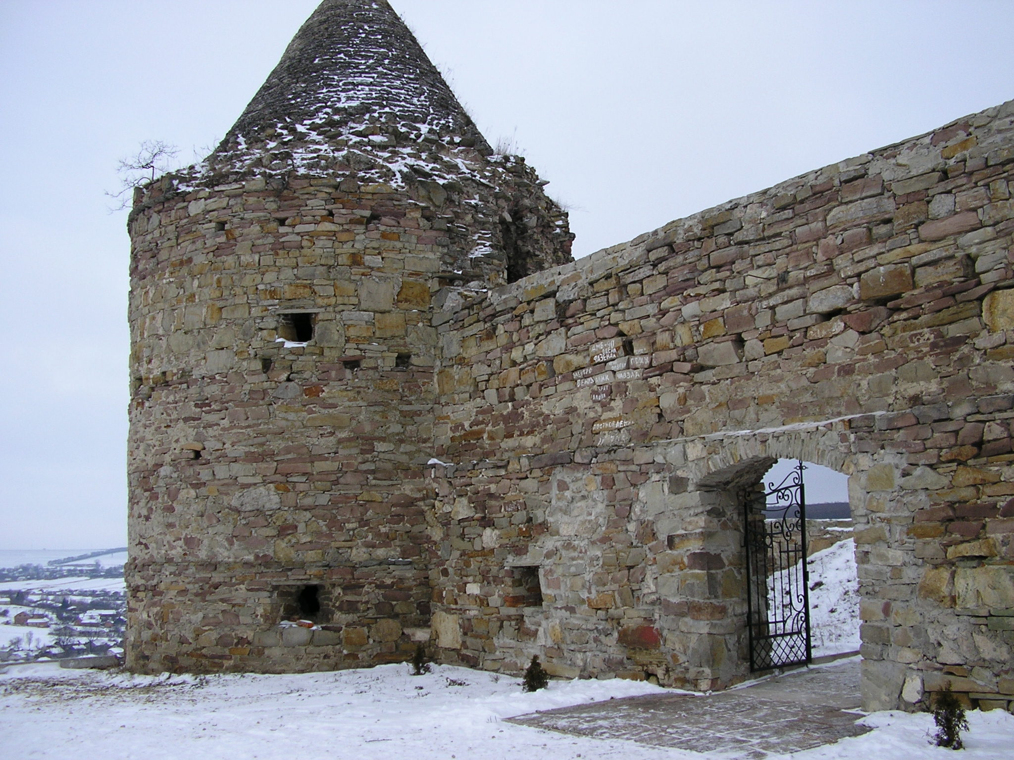 Монастир у селі Підгора: Монастир кінця XVI століття у селі Підгора, на околиці Теребовлі